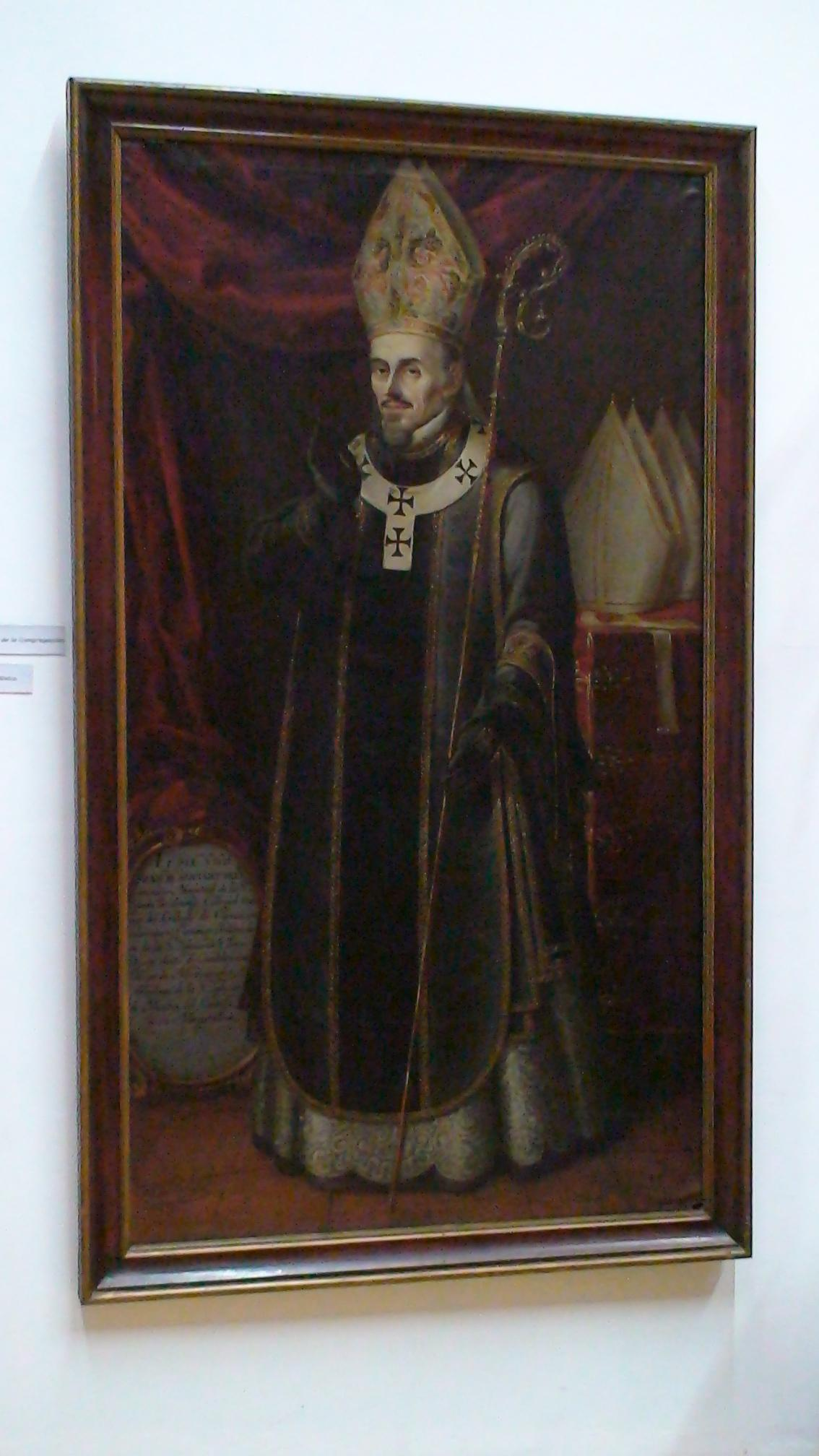 Portrait of Francisco de Aguiar y Seijas (1632-1698)